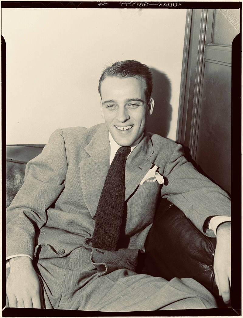 Nedersaksies: Neal Hefti, New York